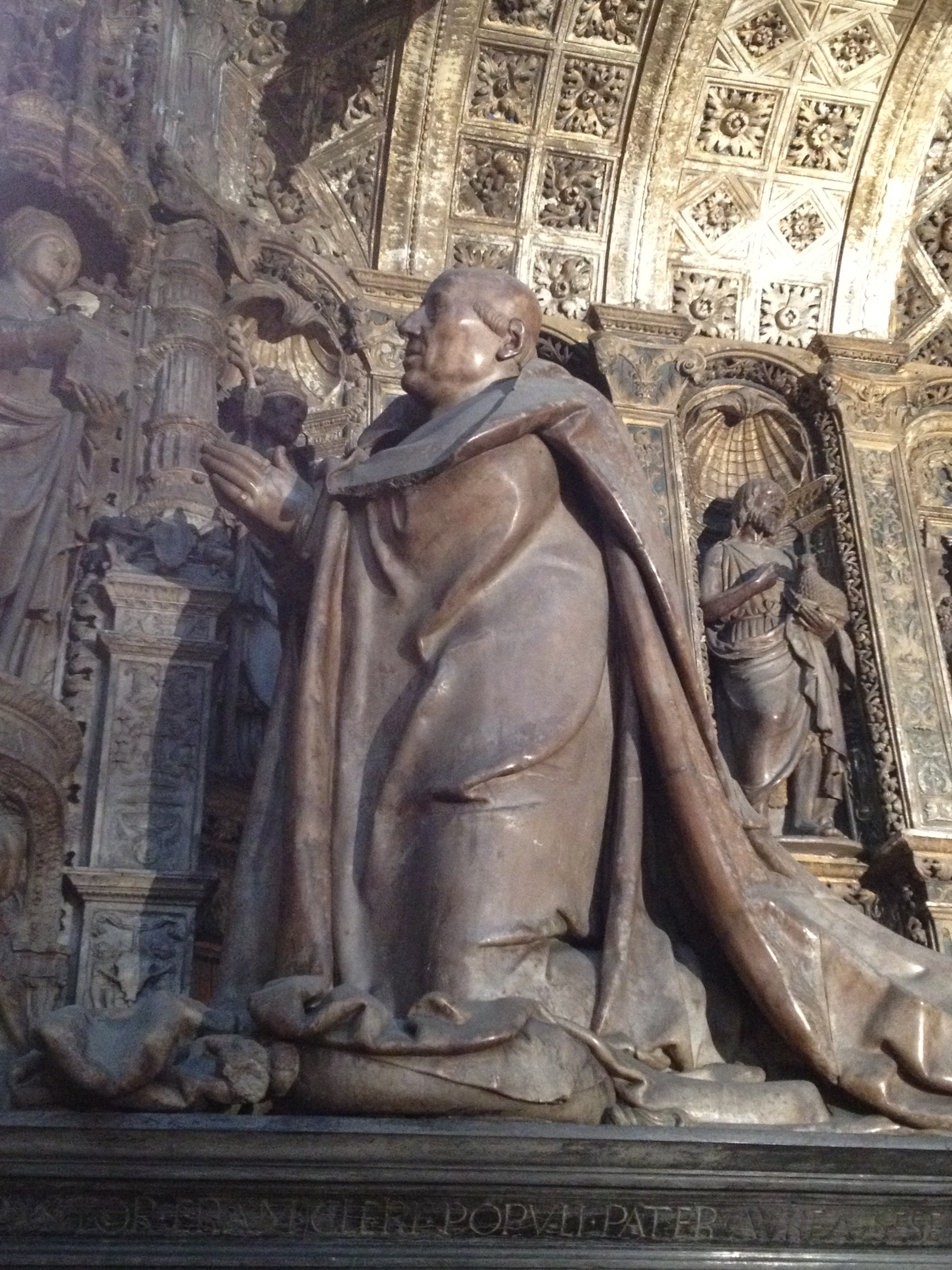 Orant de Georges Ier d'Amboise, partie du Mausolée des cardinaux d'Amboise, œuvre de Roulland Le Roux